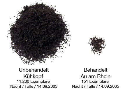 Stechmückenbesatz im Vergleich